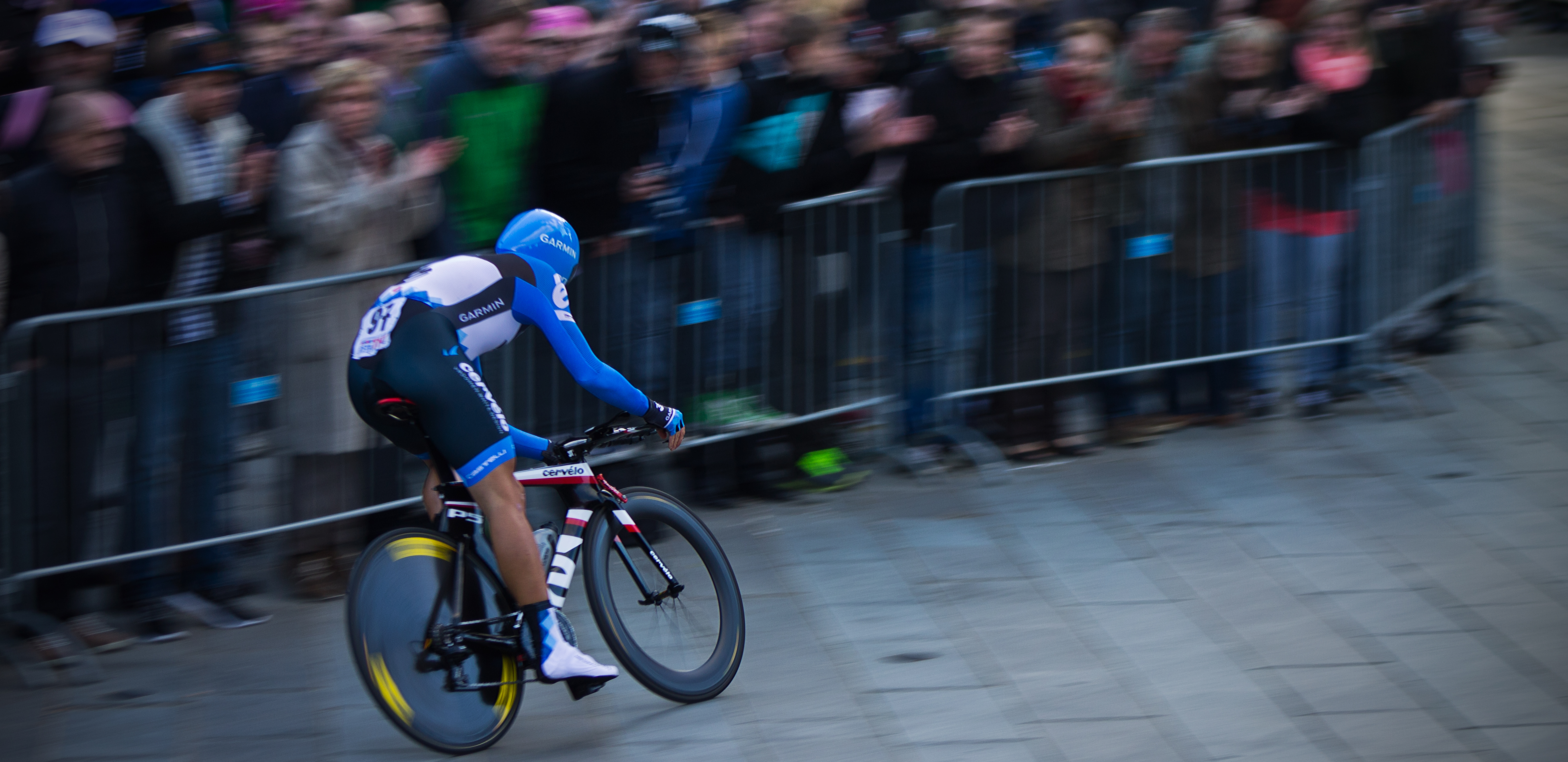 RASMUSSEN Alex #97